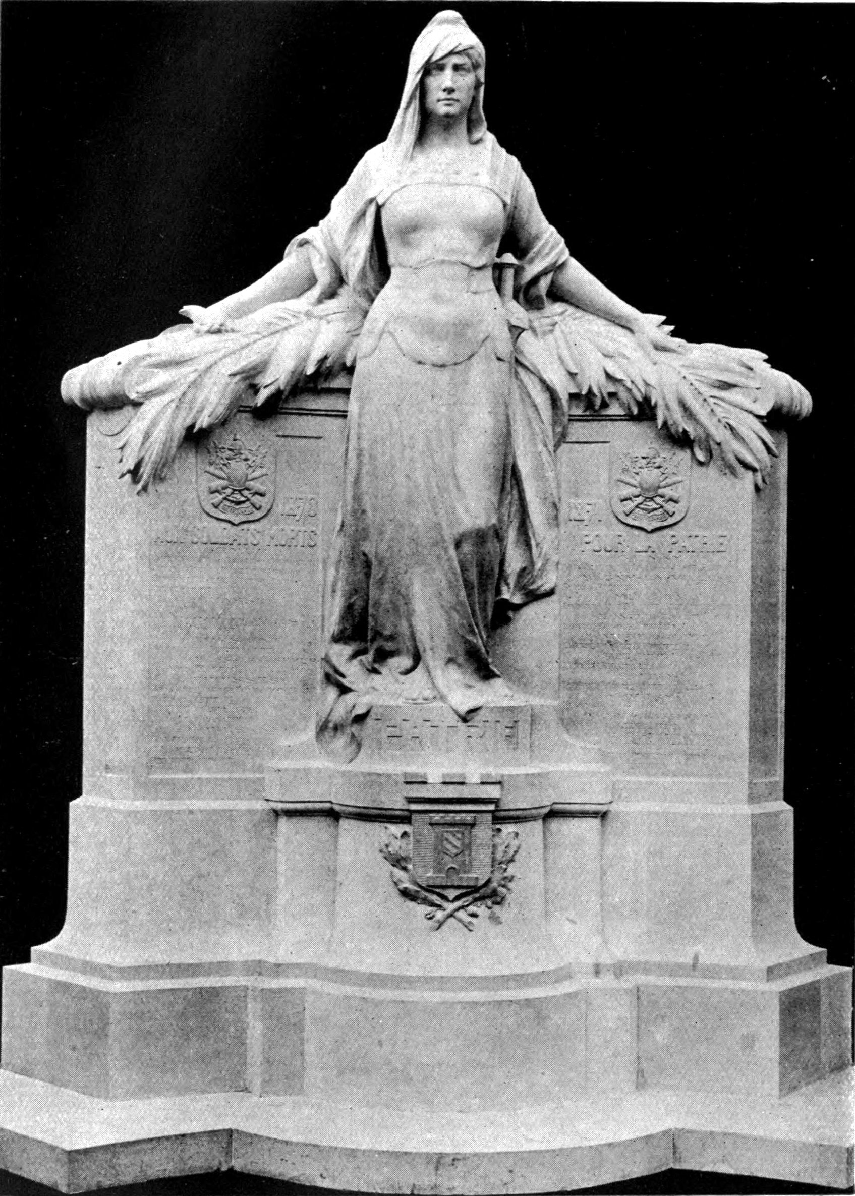 Aux soldats du canton de Semur-en-Auxois (1909), morts pour la Patrie durant la guerre de 1870